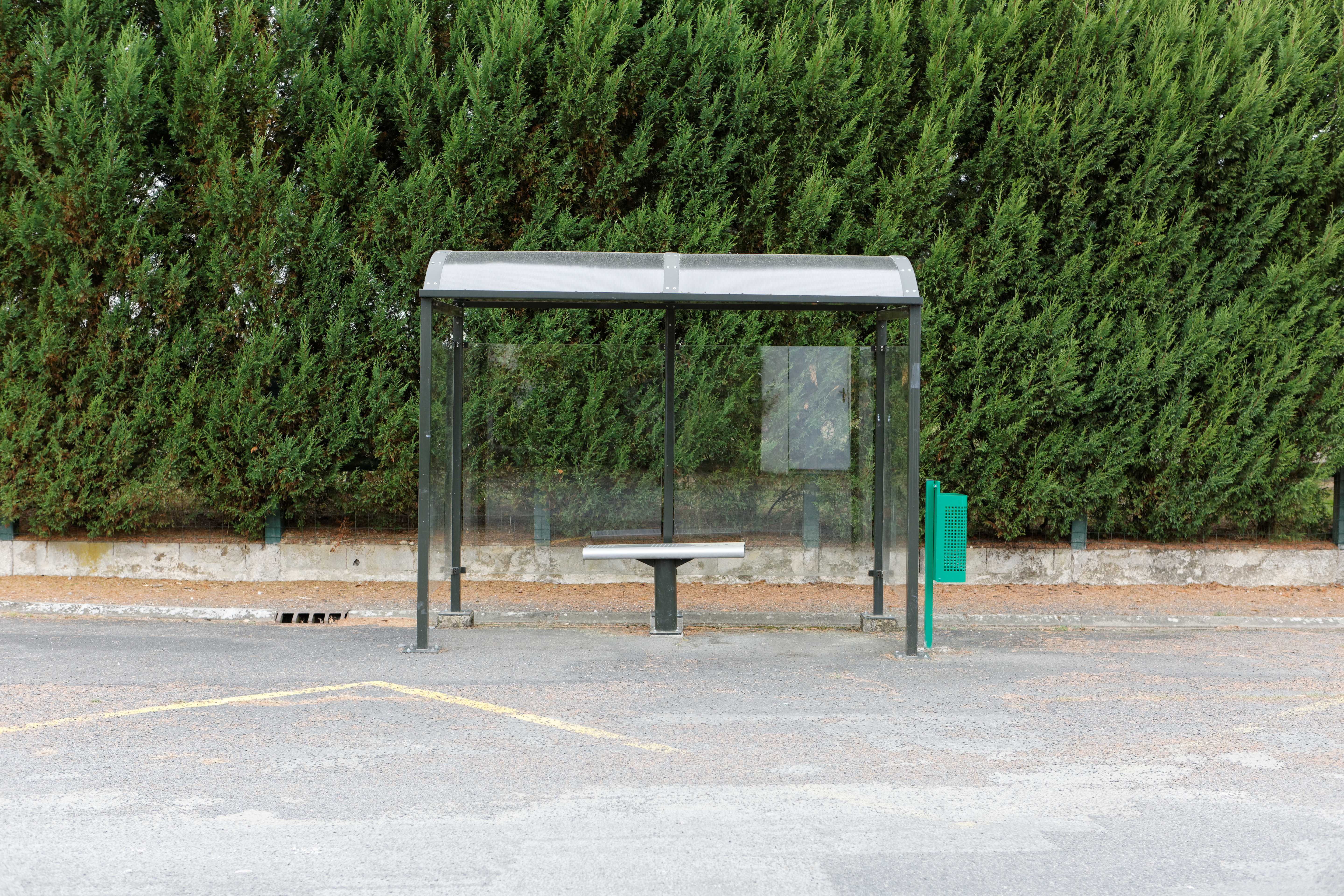 Montreuil-en-Touraine durant l'Opération Libre.